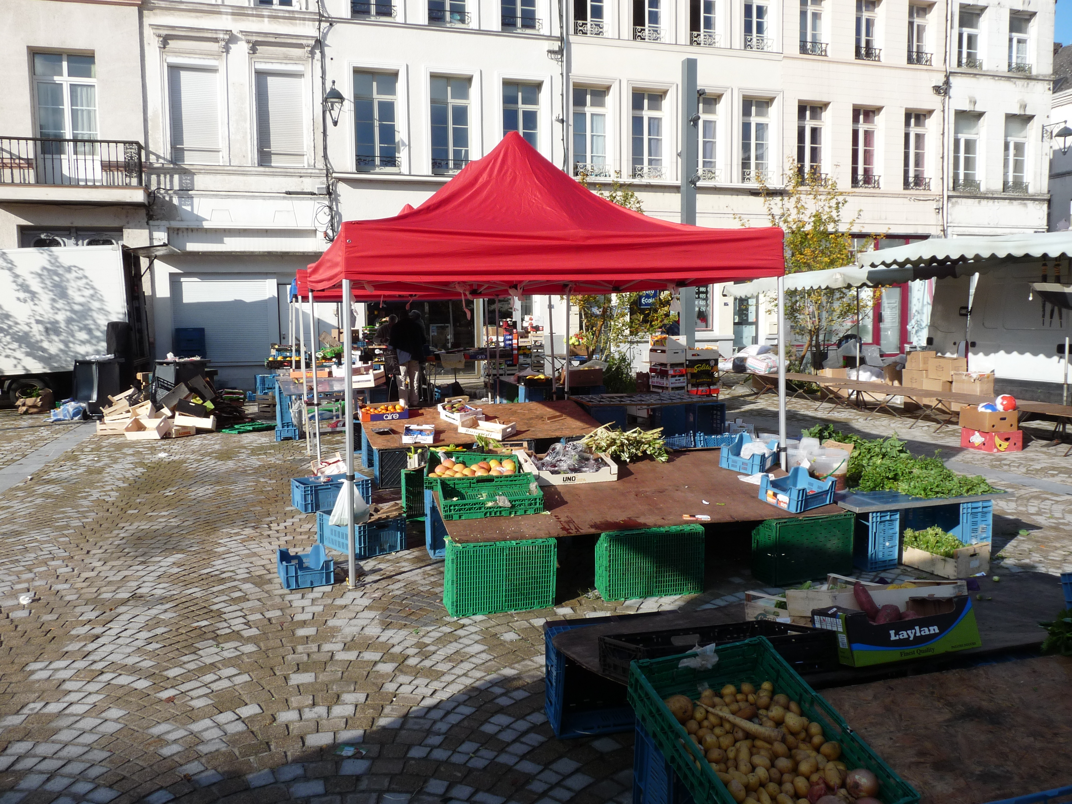 Condé-sur-l'Escaut in november 2019